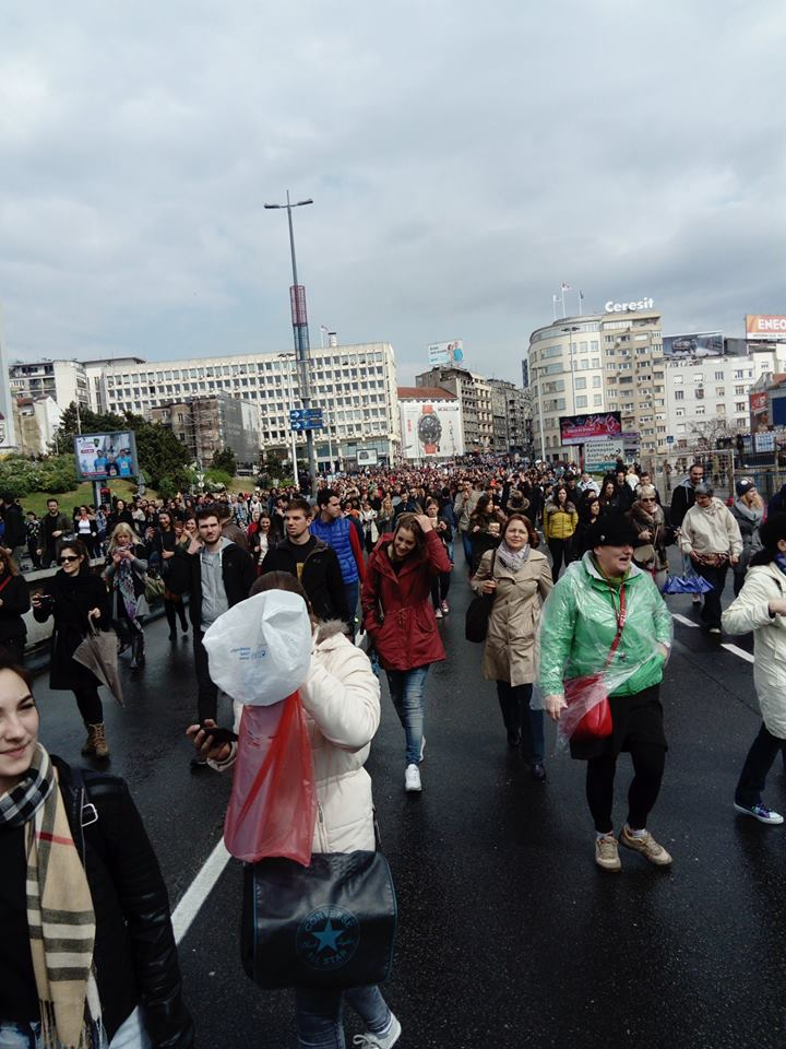 Protest 8. aprila 2017.